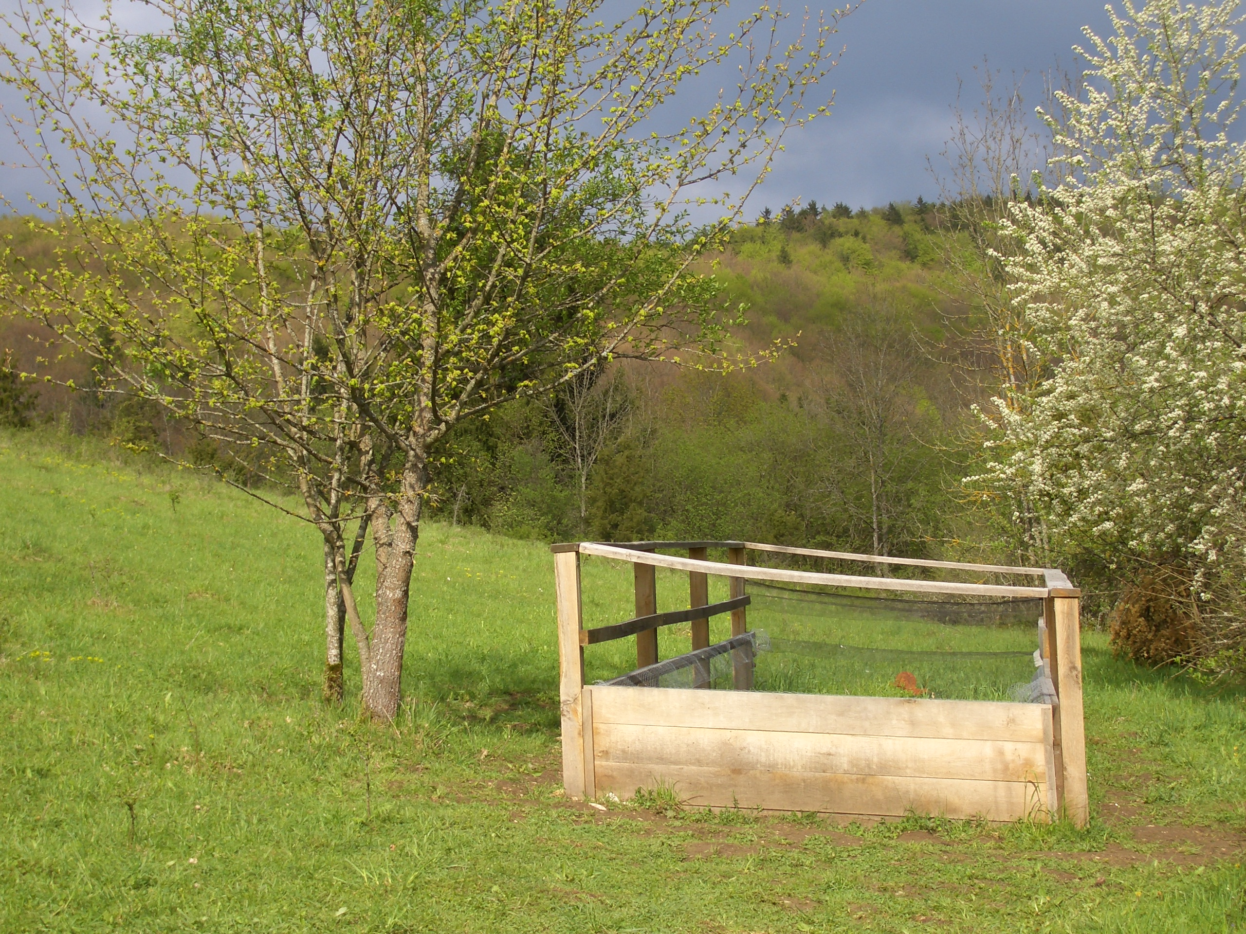 Historischer Schneckengarten, Hayingen, Deutschland